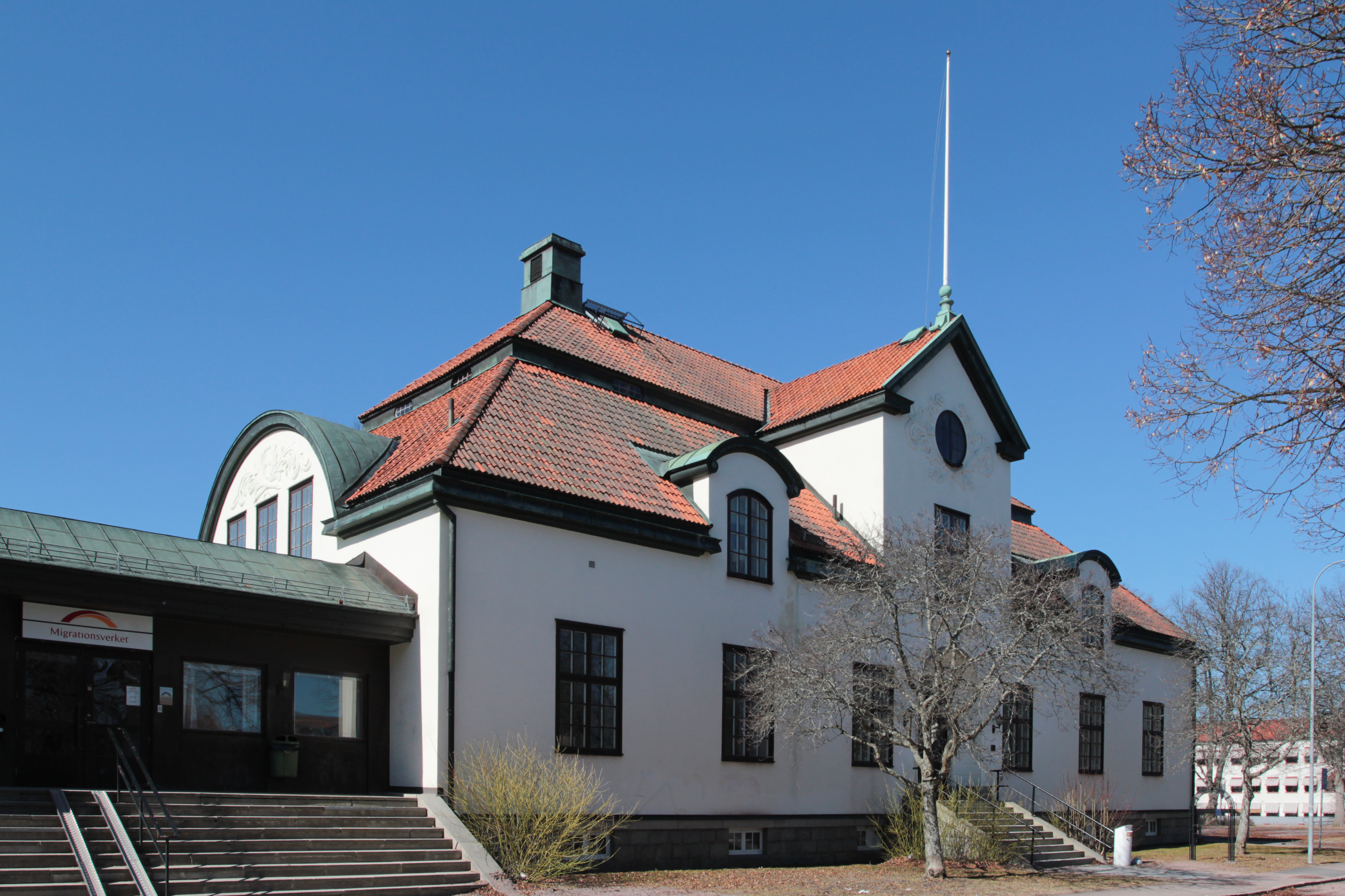 Tingshuset, Hedemora, Sverige